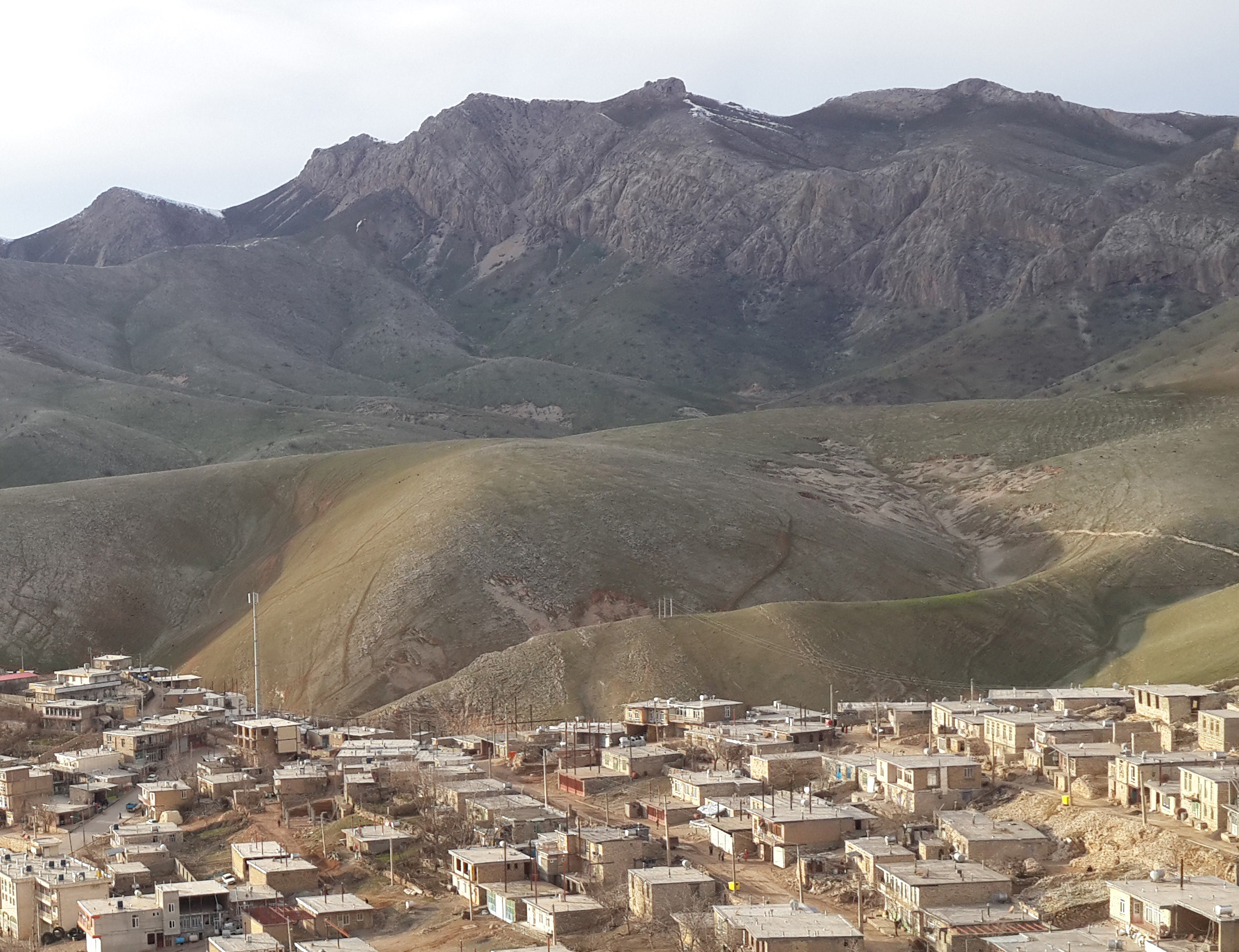 کوه آتشگاه یا آتشکده در پشت شهر بانه‌وره در شهرستان پاوه Kurdî: Kejî atejge le pişt şarî banewrrê le şaristanî pawe کوردی: کەژی ئاتەژگە لە پشت شاری بانەوڕێ لە شارستانی پاوە